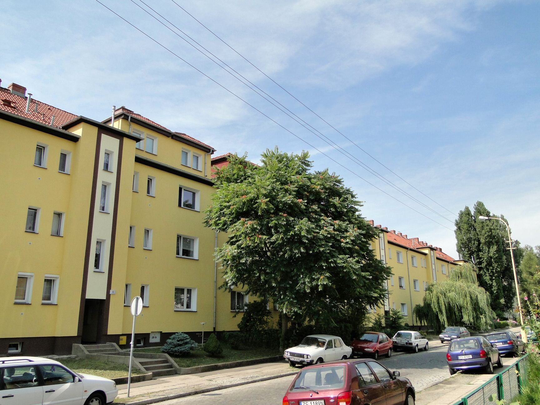 Ulica Brodzińskiego w Szczecinie